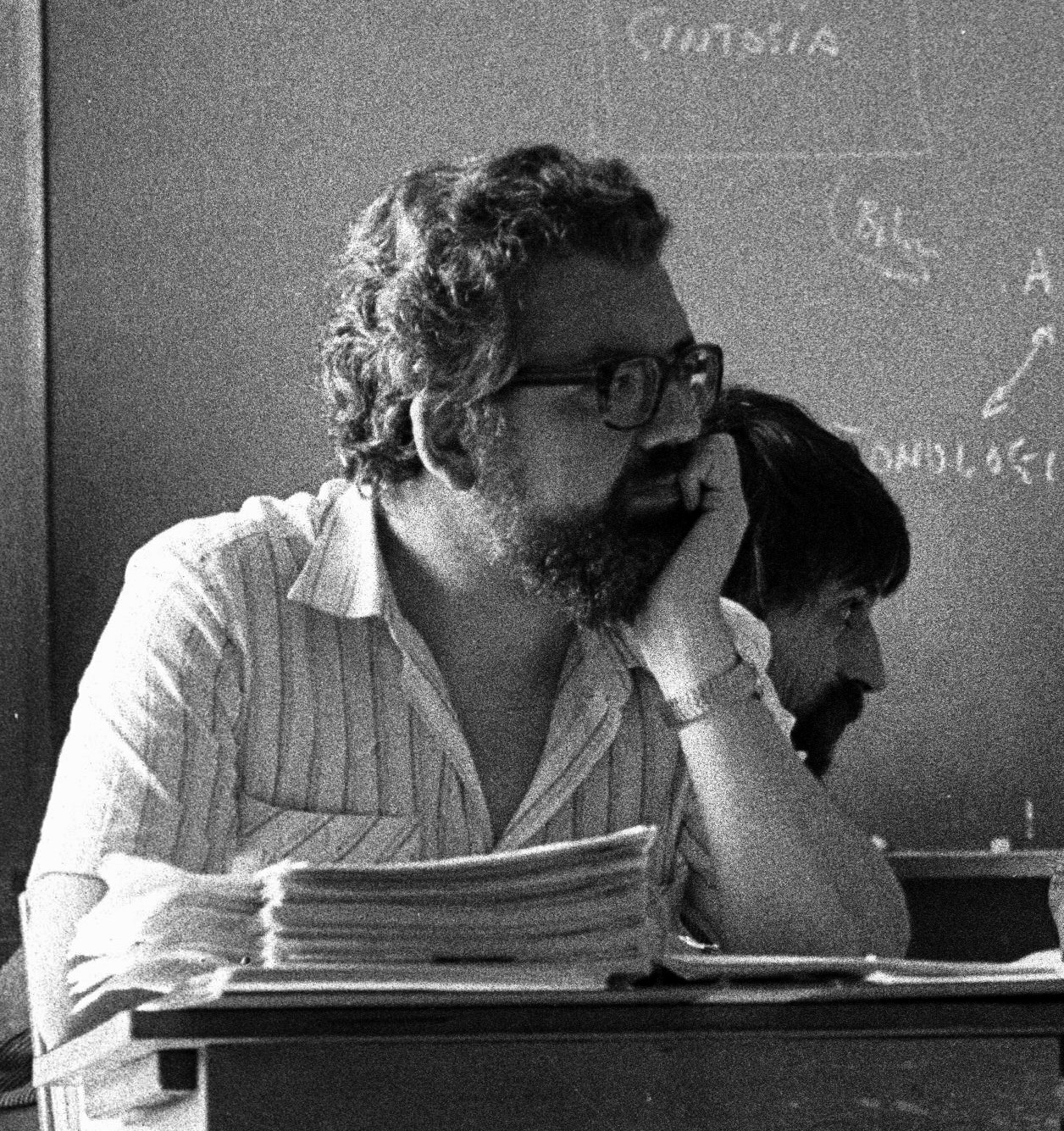 Paulo Agirrebaltzategi Iruñean 1984an Udako Euskal Unibertsitateko ikastaro batean.